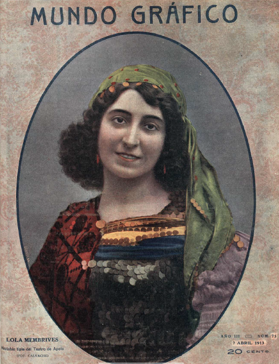 Portada de la revista española Mundo Gráfico dedicada a la actriz argentina Lola Membrives